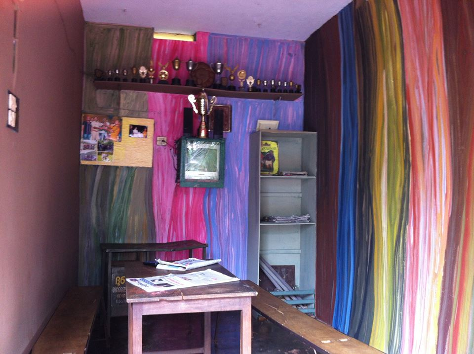 Disco Arts&Sports Club Pookulam bazar